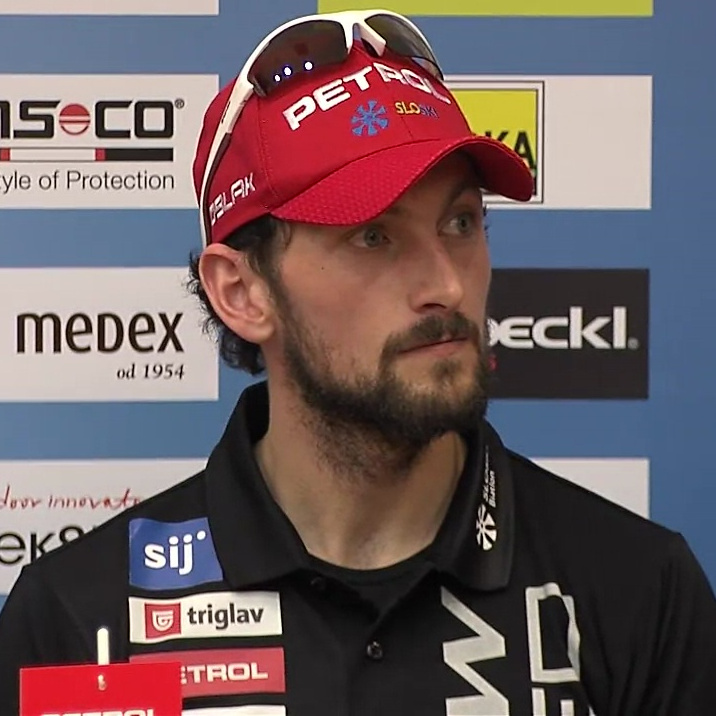 Jakov Fak